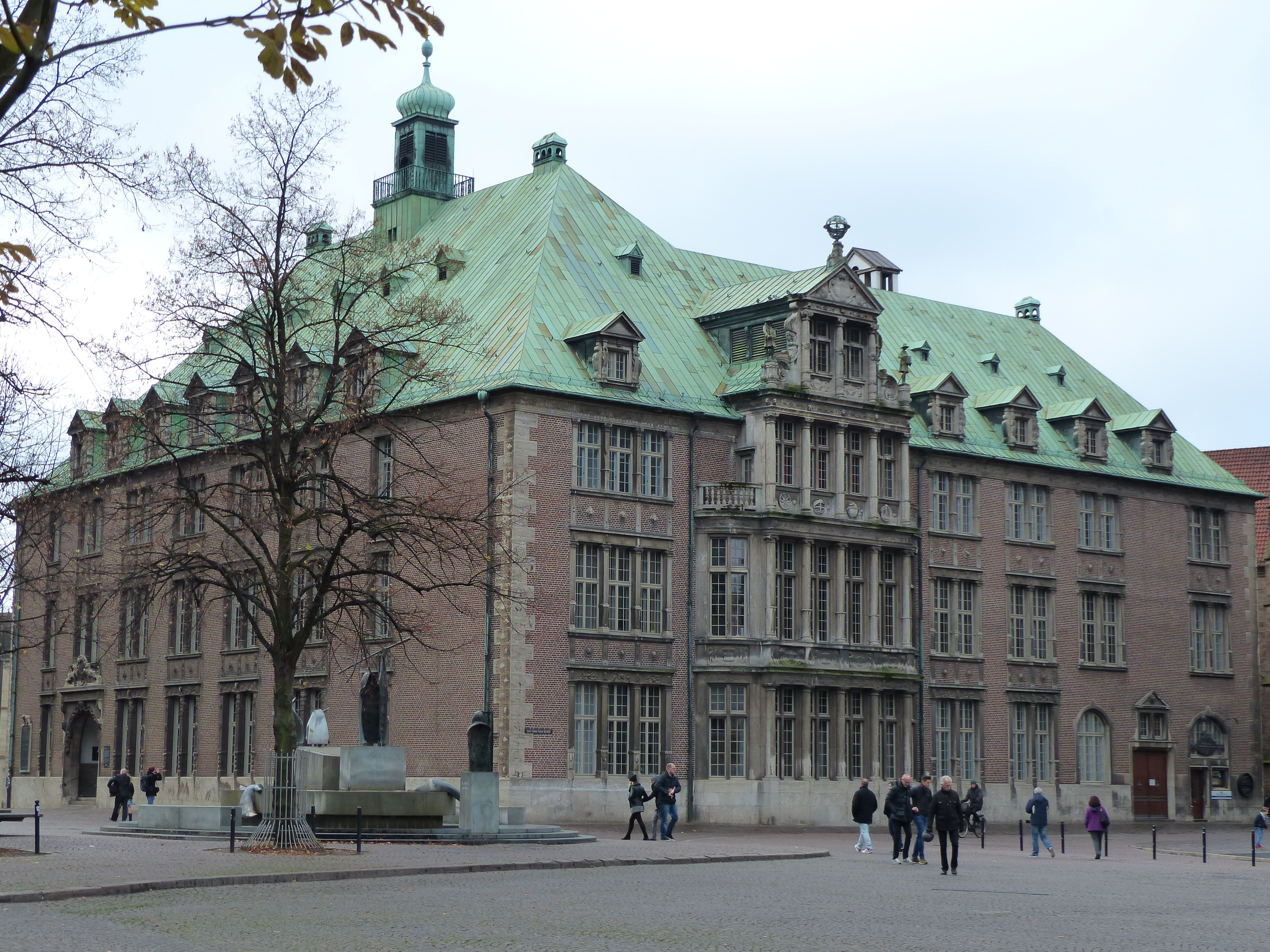 Bremen: Neues Rathaus vom Domshof mit Neptunbrunnen